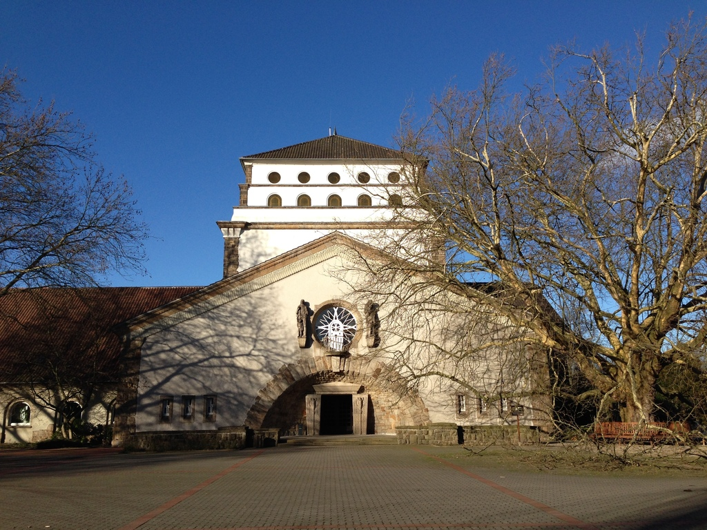 Hauptgebäude Hauptfriedhof DortmundThis is a photograph of an architectural monument., no. A 1037